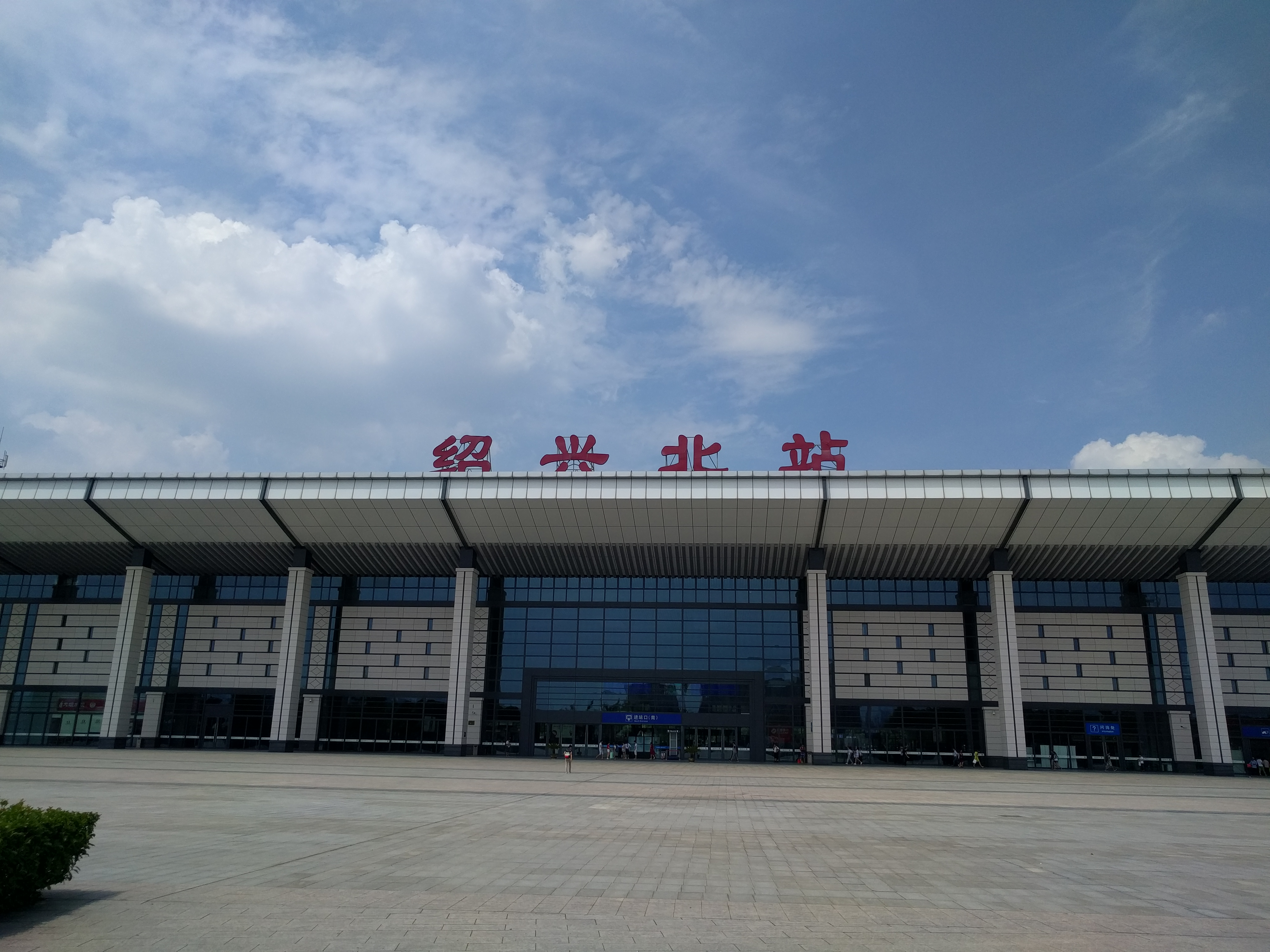 高铁绍兴北站